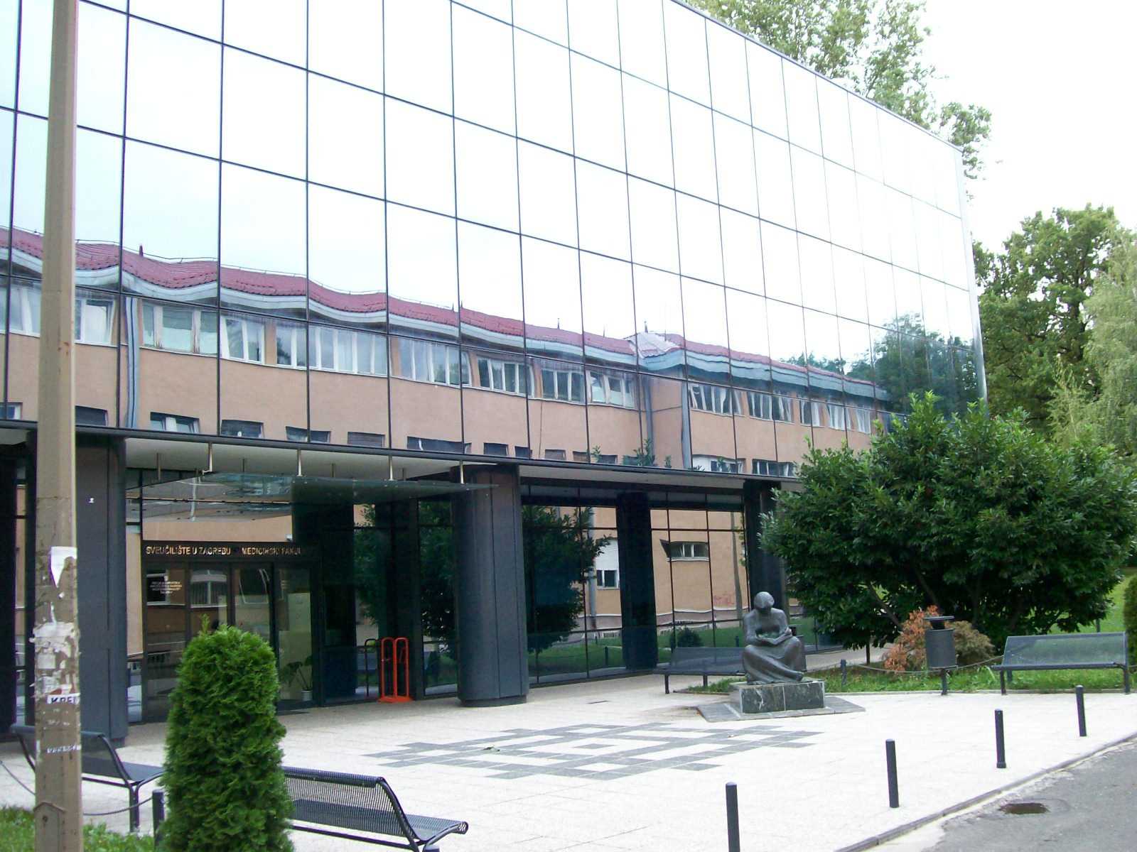 Medicinski fakultet u Zagrebu, na Šalati